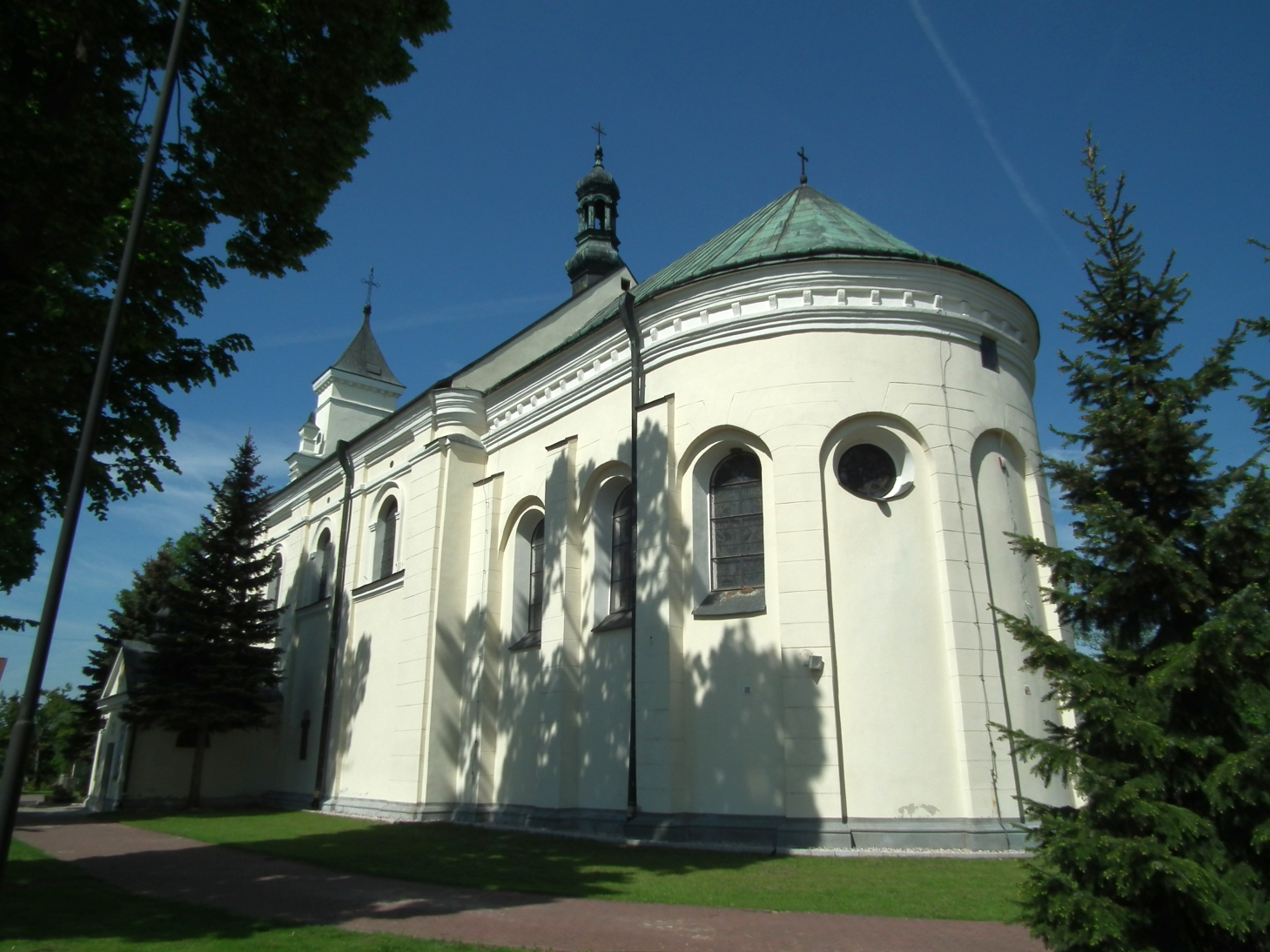 Kościół par. p.w. Nawrócenia św. Pawła (1654-95, poł. XIX) Bełżyce